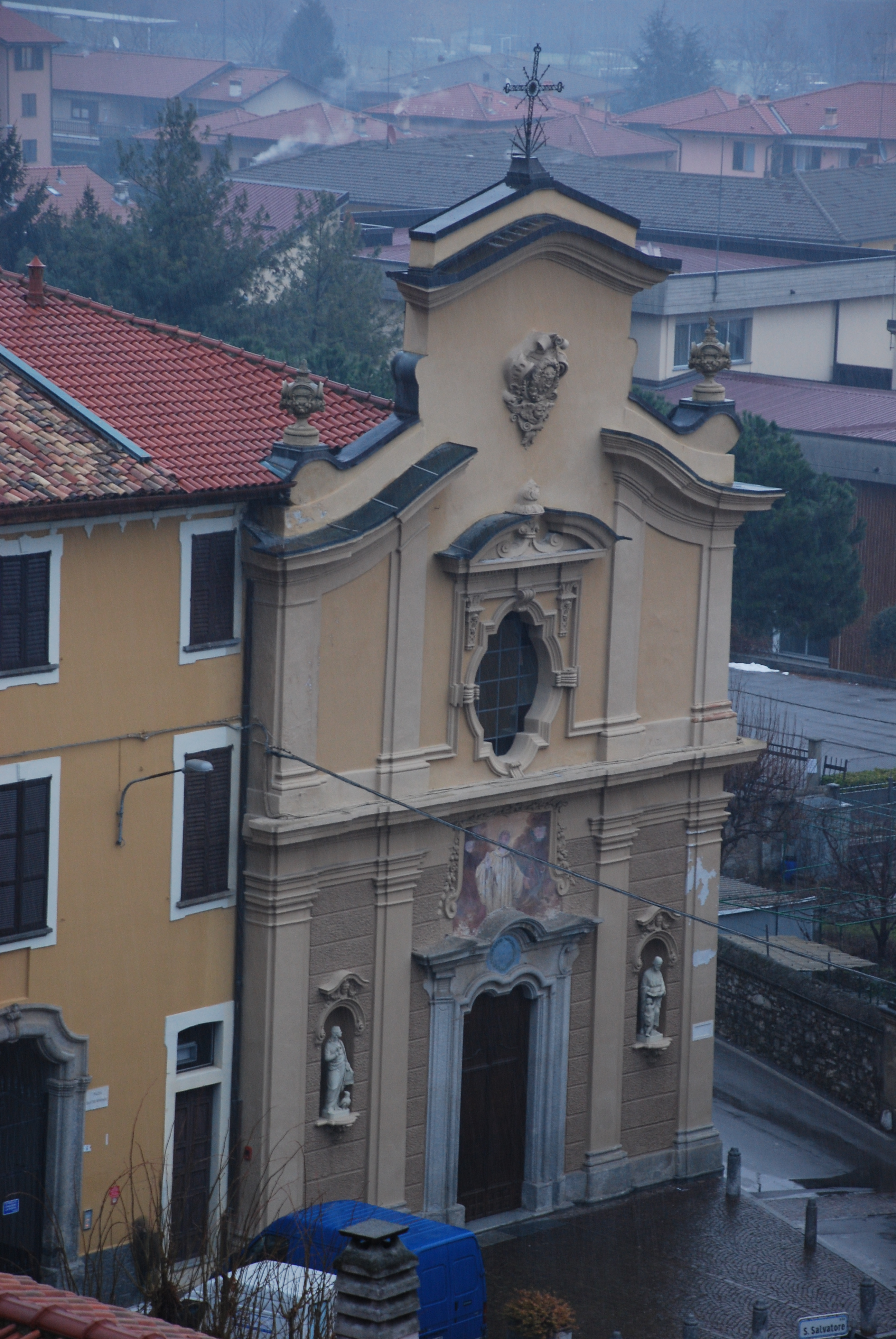 Chiesa San Bernardo Lezza 1